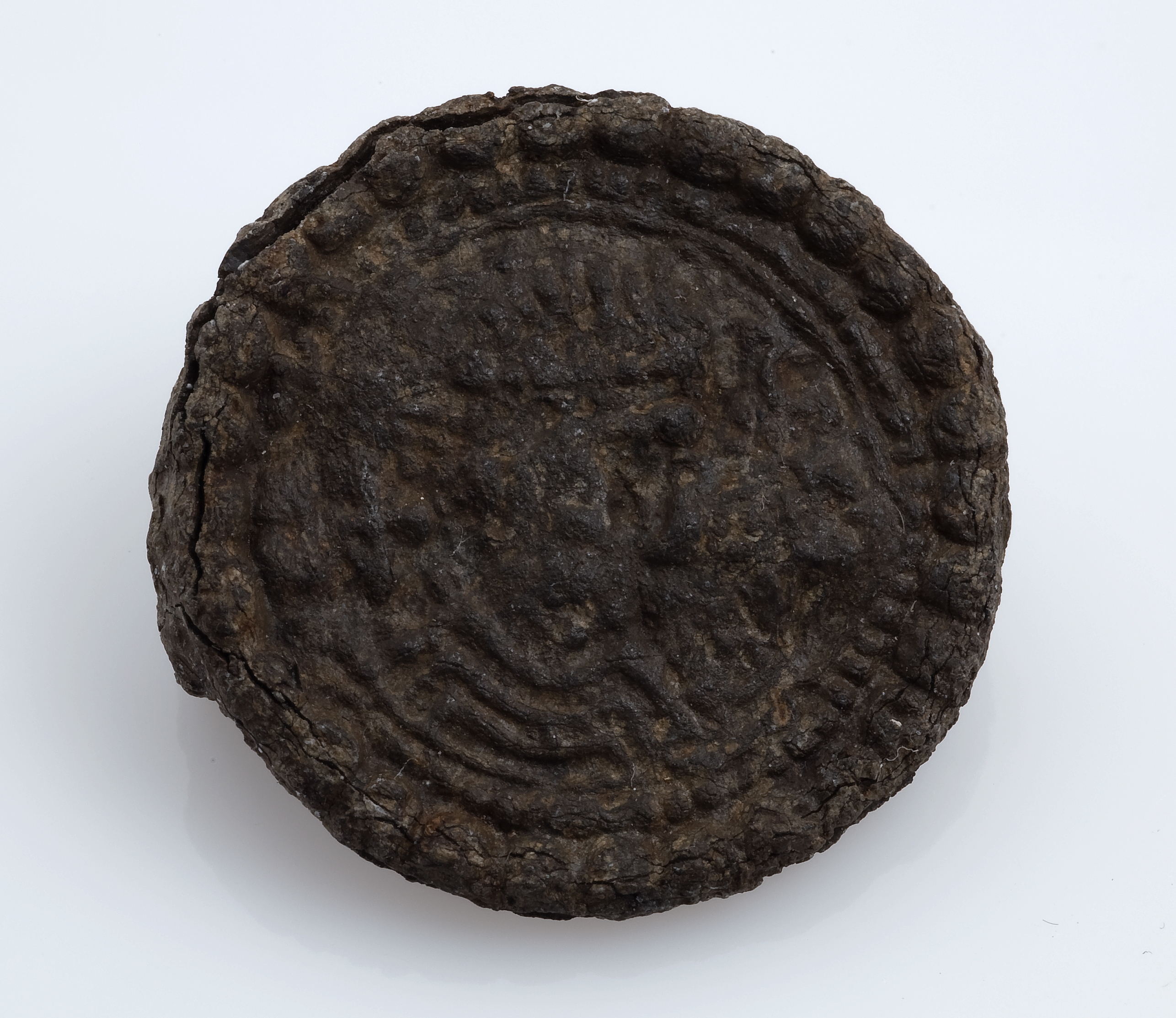 Schijffibula versierd met portret en omschrift. Samenstelling metaal onduidelijk. Imitatiemunt, gemaakt naar een bestaande munt. Aan de achterzijde het restant van de speldbevestigingː montuur voor de naald en het borgoog. Omschrift onleesbaar. Bodemvondst Spijkenisse-Baljuwlaan Afmetingː 27 mm Inventarisnr.ː Museum Rotterdam 8674 Beschreven inː Een middeleeuwse schijffibula / C.J. Herweijer. - Inː Westerheem ː tweemaandelijks orgaan van de Archeologische Werkgemeenschap voor Nederland, Jg. XXV, no. 2 (april 1986), p. 115-116. Digitaal beschikbaar viaː